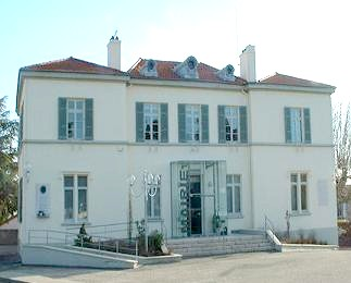 Description Mairie de Grézieux-La-Varenne DateMay 2009SourceOwn work by the original uploaderAuthordivivi } Mairie de Grézieux-La-Varenne